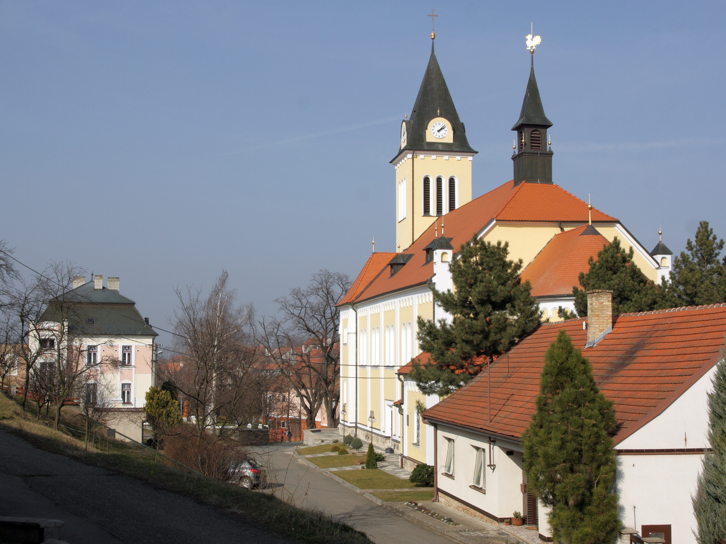 Šitbořice - kostel sv Mikuláše a fara.